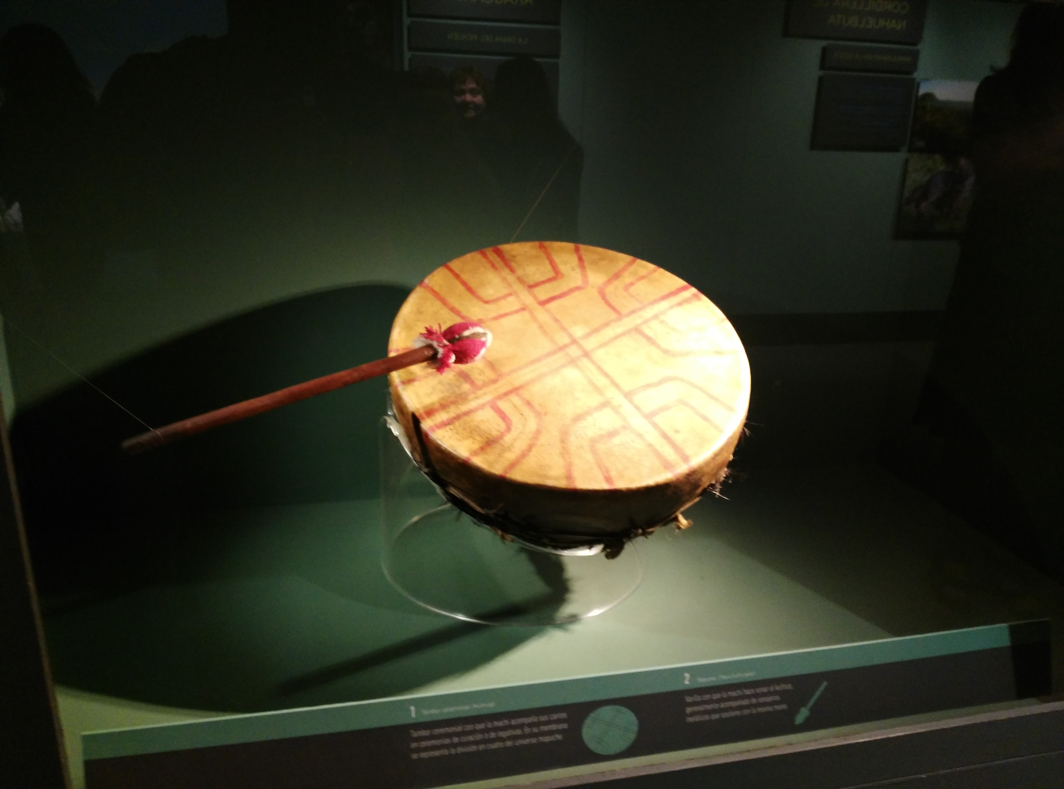 Kultrun parte de la colección del Museo Nacional de Historia Natural